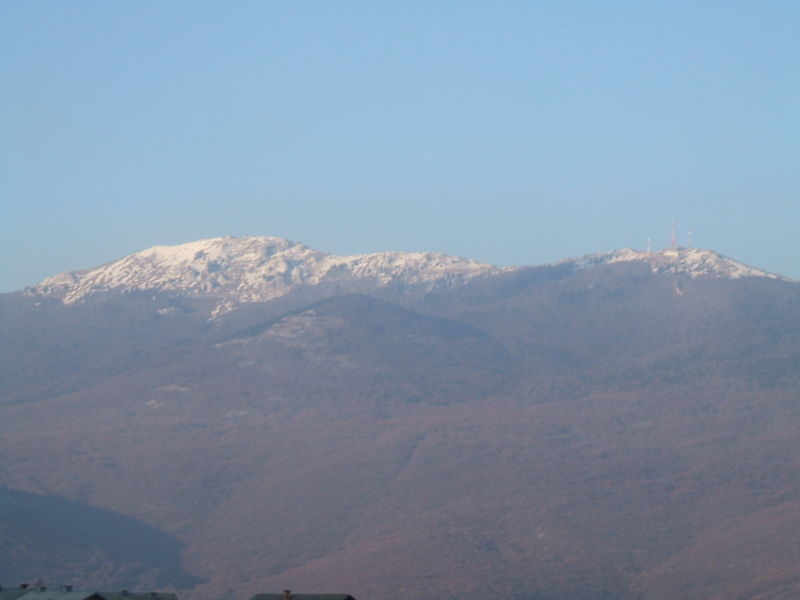 Srpskohrvatski / српскохрватски: Snježni vrhovi Plješevice/Ličke Plješivice